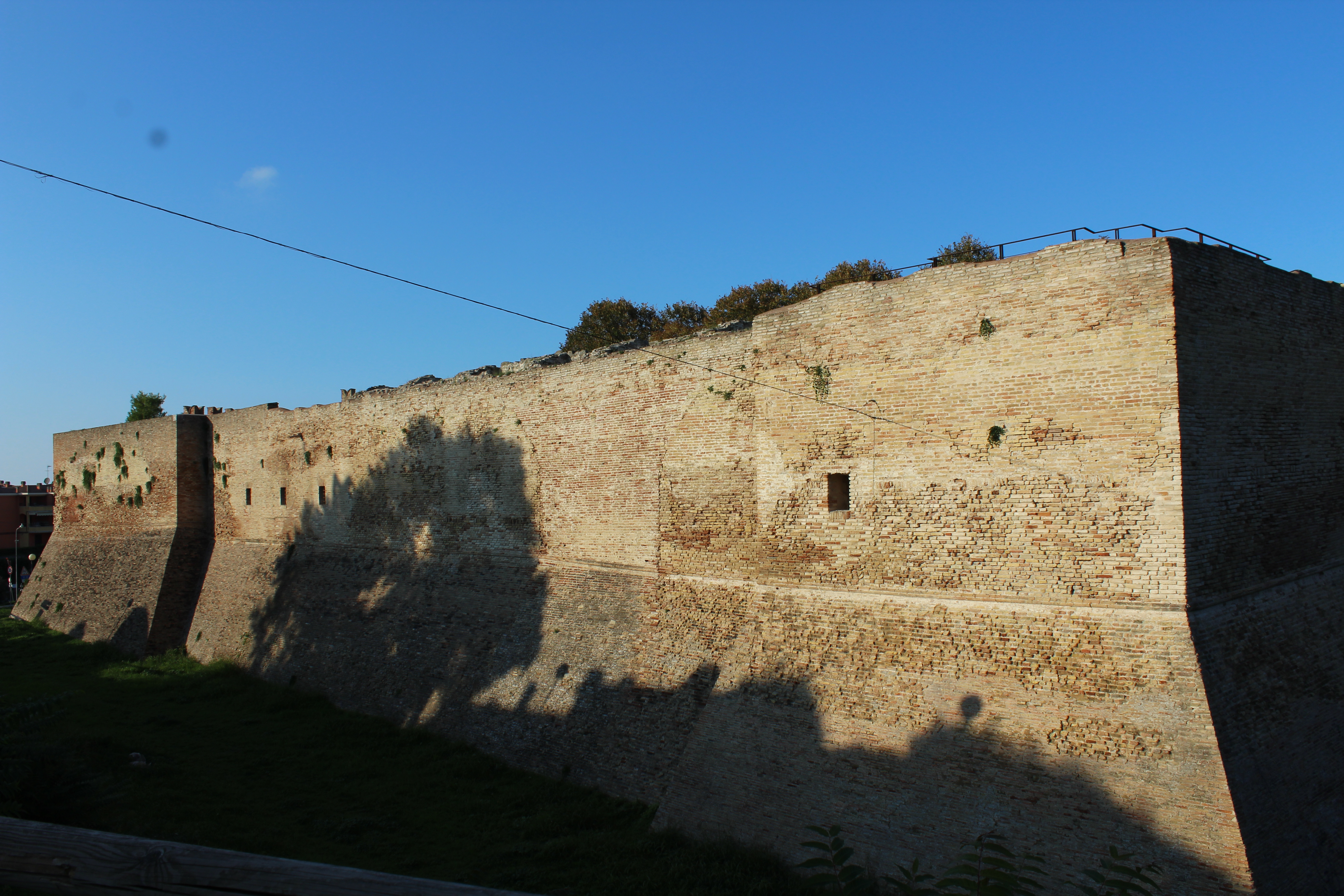 La Rocca Malatestiana è una costruzione militare del XV secolo voluta da Sigismondo Malatesta e costruita da Matteo Nuti a Fano. This is a photo of a monument which is part of cultural heritage of Italy.